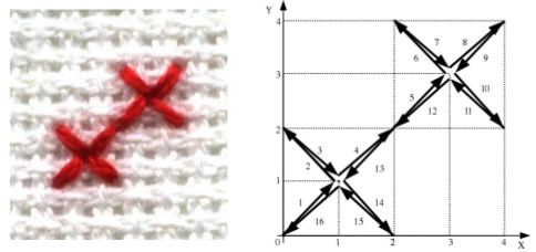 Подвійні хрестоподібні елементи